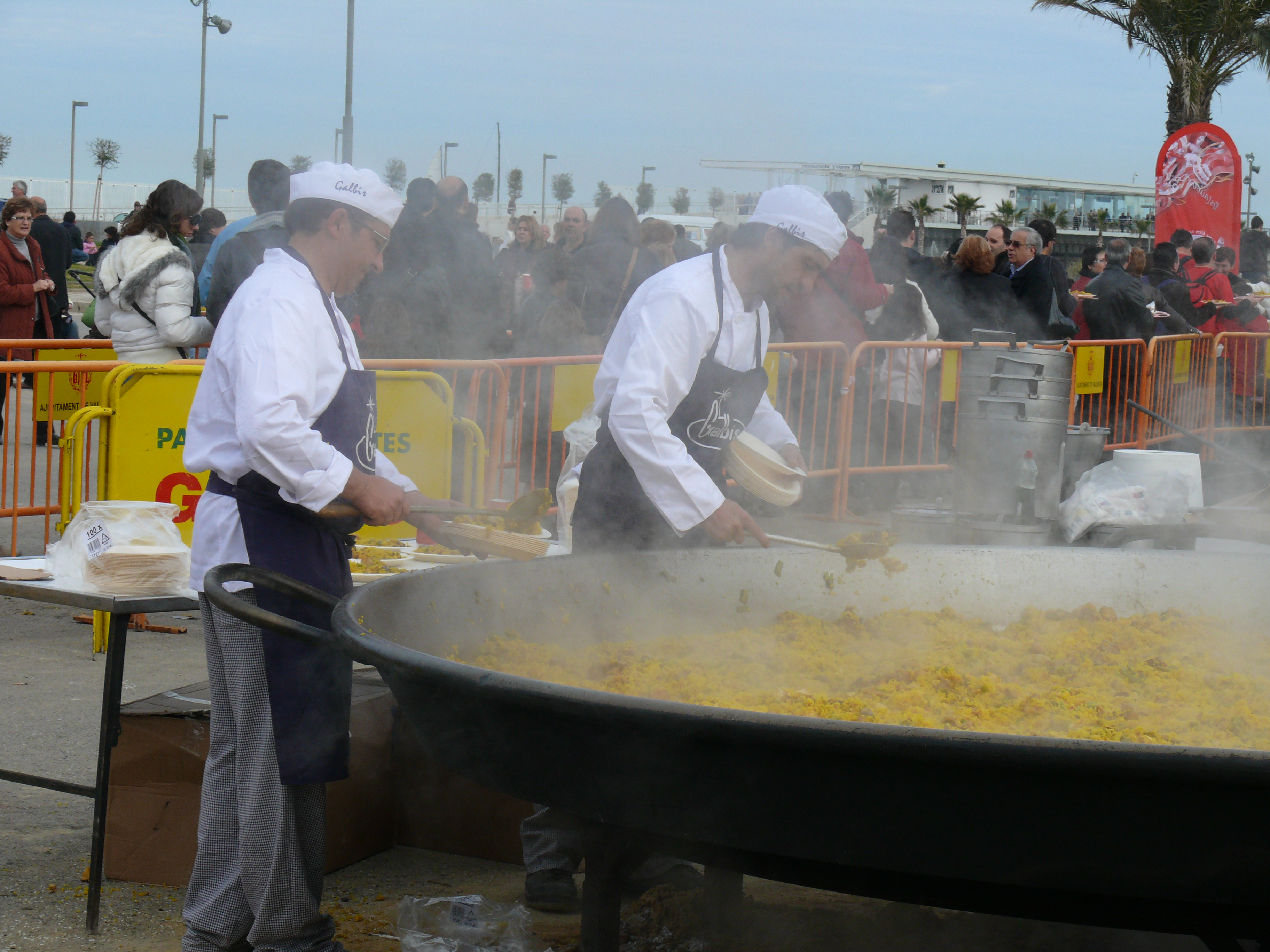 Preparación de una paella gigante en la dársena de Valencia, a cargo de la Cofradía Internacional del Arroz, para el evento solidario 'Un granito por Haití', destinado a recaudar fondos de ayuda para el devastador terremoto de 2010 en Haití. Se sirvieron 3.200 raciones, con las que se recaudaron aproximadamente 16.000 euros destinados a Médicos sin Fronteras. Entre las colaboradoras se encuentran Galbis Paellas Gigantes, Makro, Valencia CF, D. O. Arroz de Valencia, Azafranes Sabater, y I.G.P. Cítricos Valencianos.